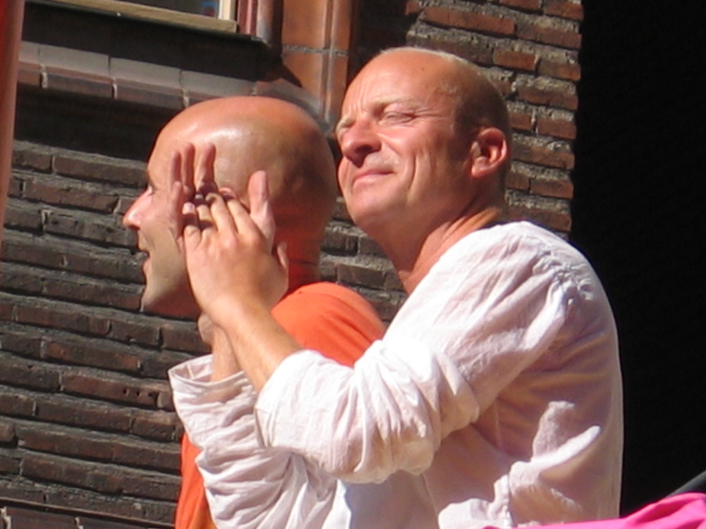 Jonas Gardell och Mark Levengood på en av lastbilarna i Stockholm Prides parad lördagen den 8 augusti 2006.